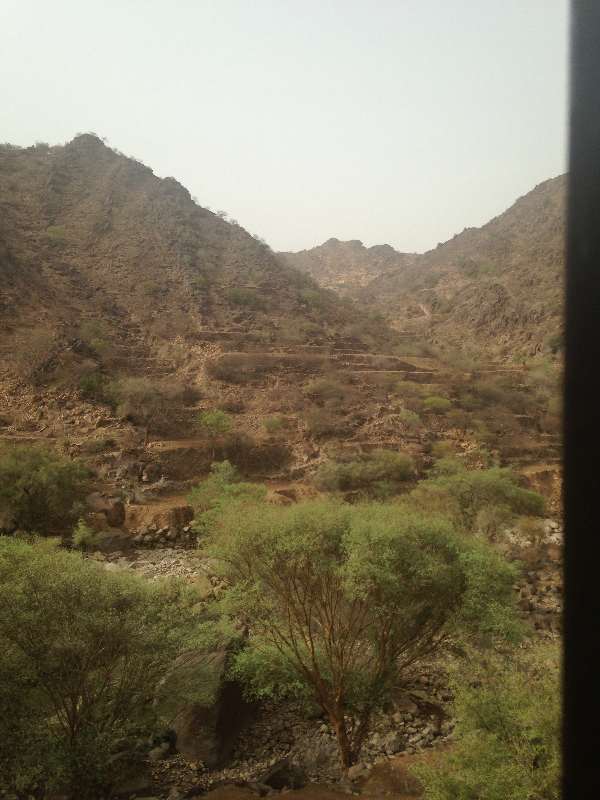 صورة من قرى شمير